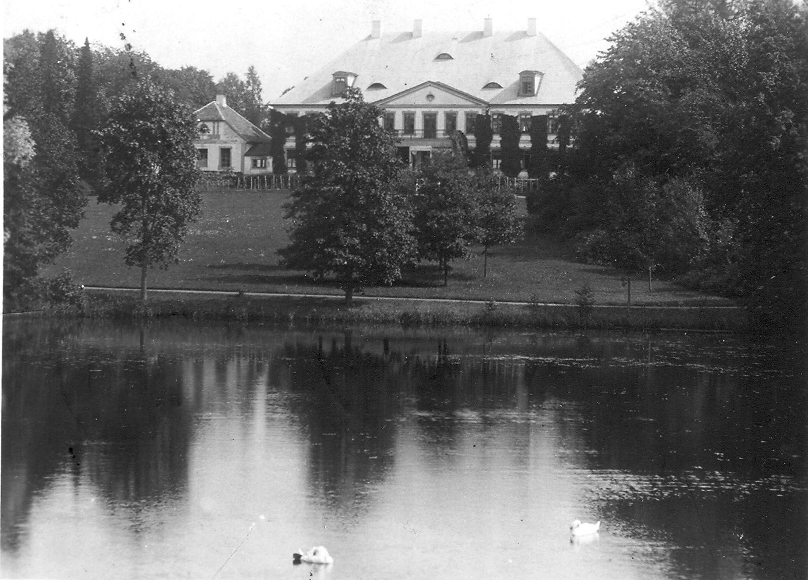 Schloss Neu-Laitzen (lettisch: Jaunlaicene) in Lettland aus dem Jahr 1911.